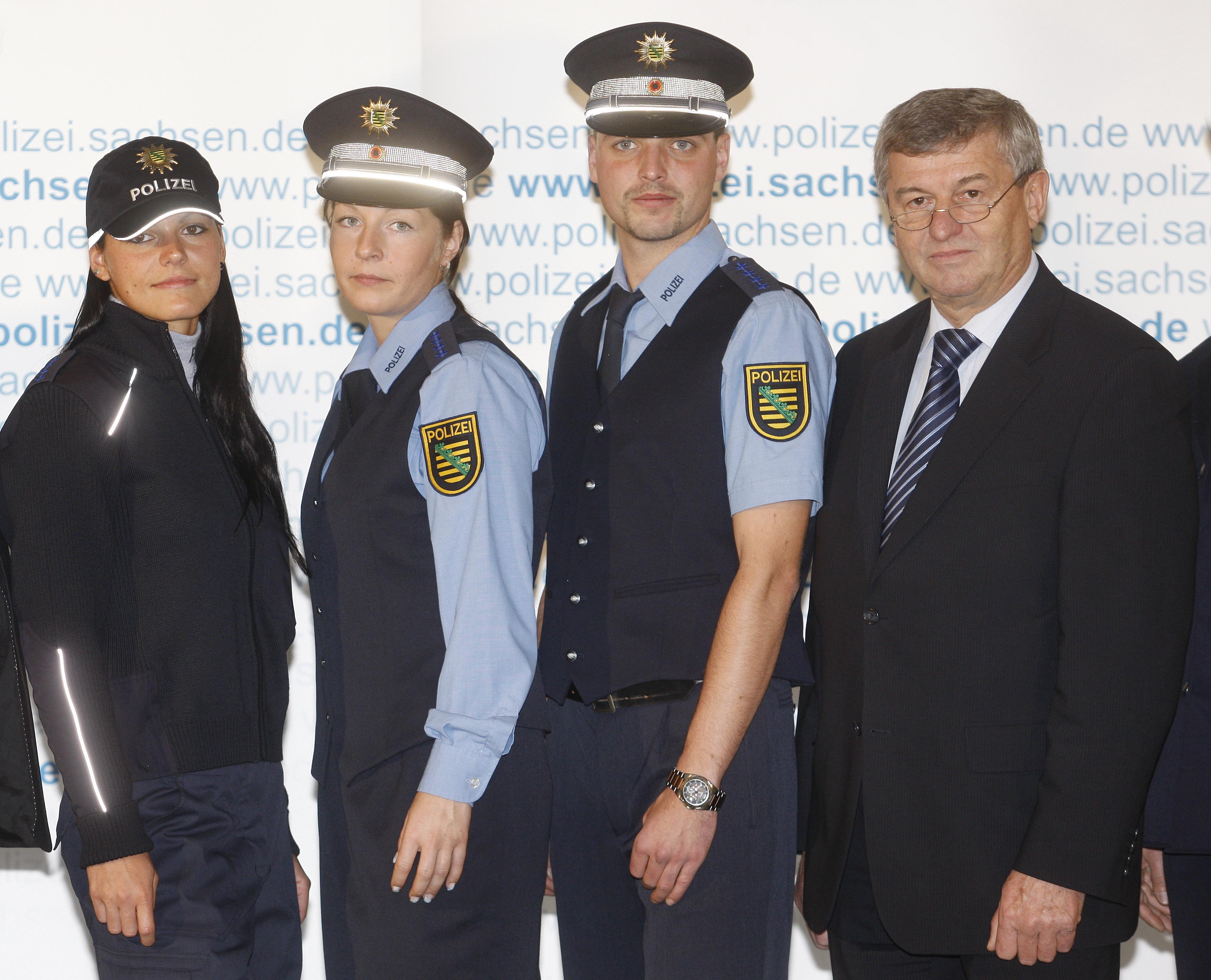 Neue blaue Uniform der Polizeien der Länder Berlin, Brandenburg und Sachsen